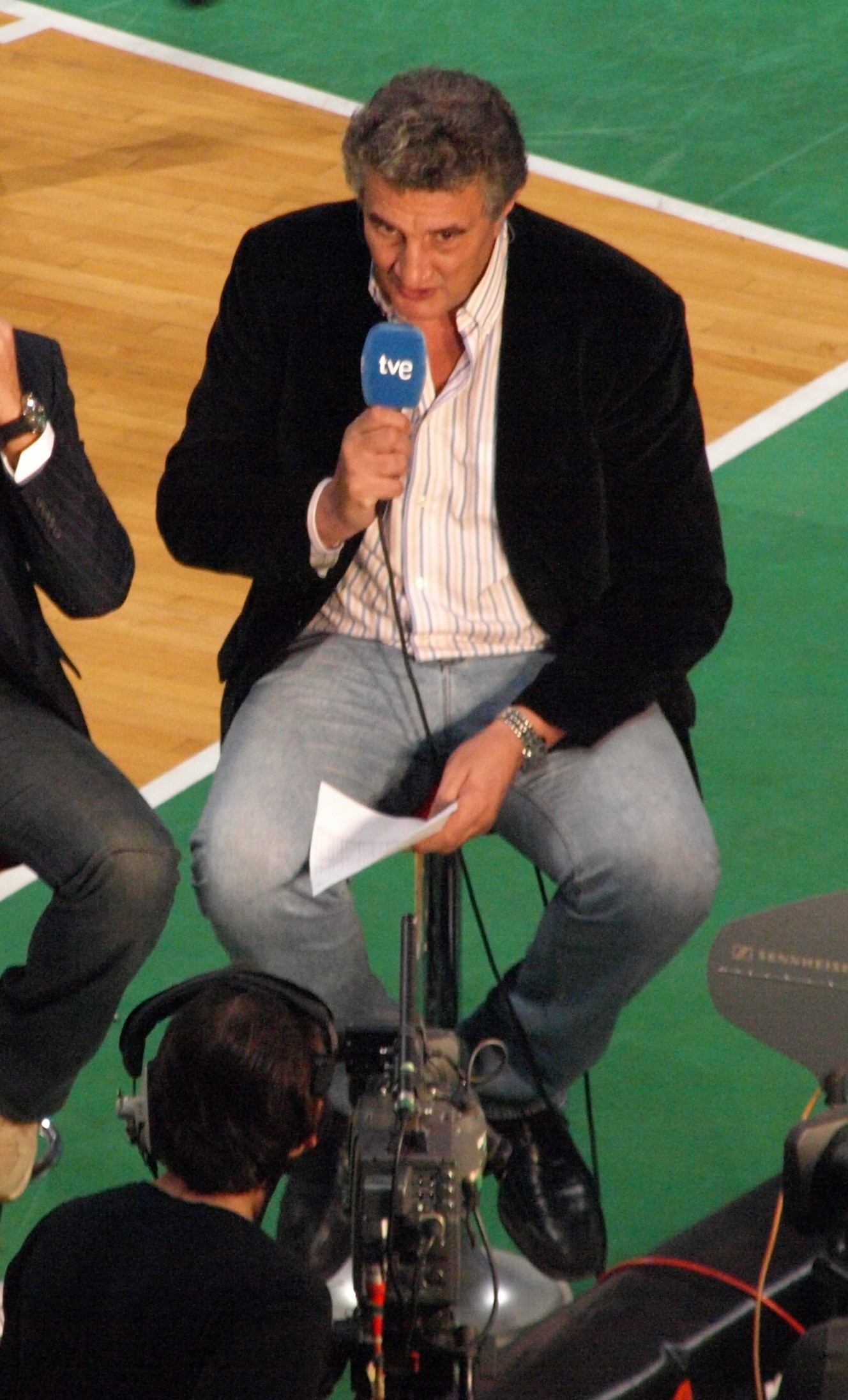 Fernando Romay en su faceta de comentarista de televisión en el pabellón Olímpico de Badalona en noviembre de 2008